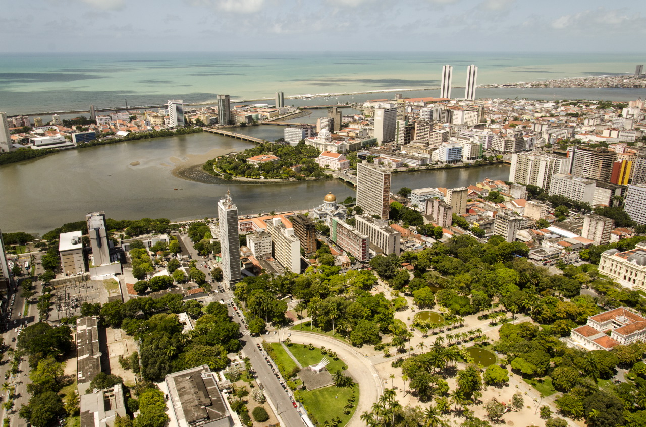 Bairros da Boa Vista, de Santo Antônio e do Recife (Centro do Recife) - Recife - Pernambuco - Brasil